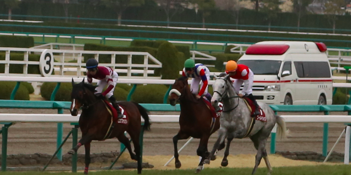 2013年阪神大賞典でのゴールドシップ